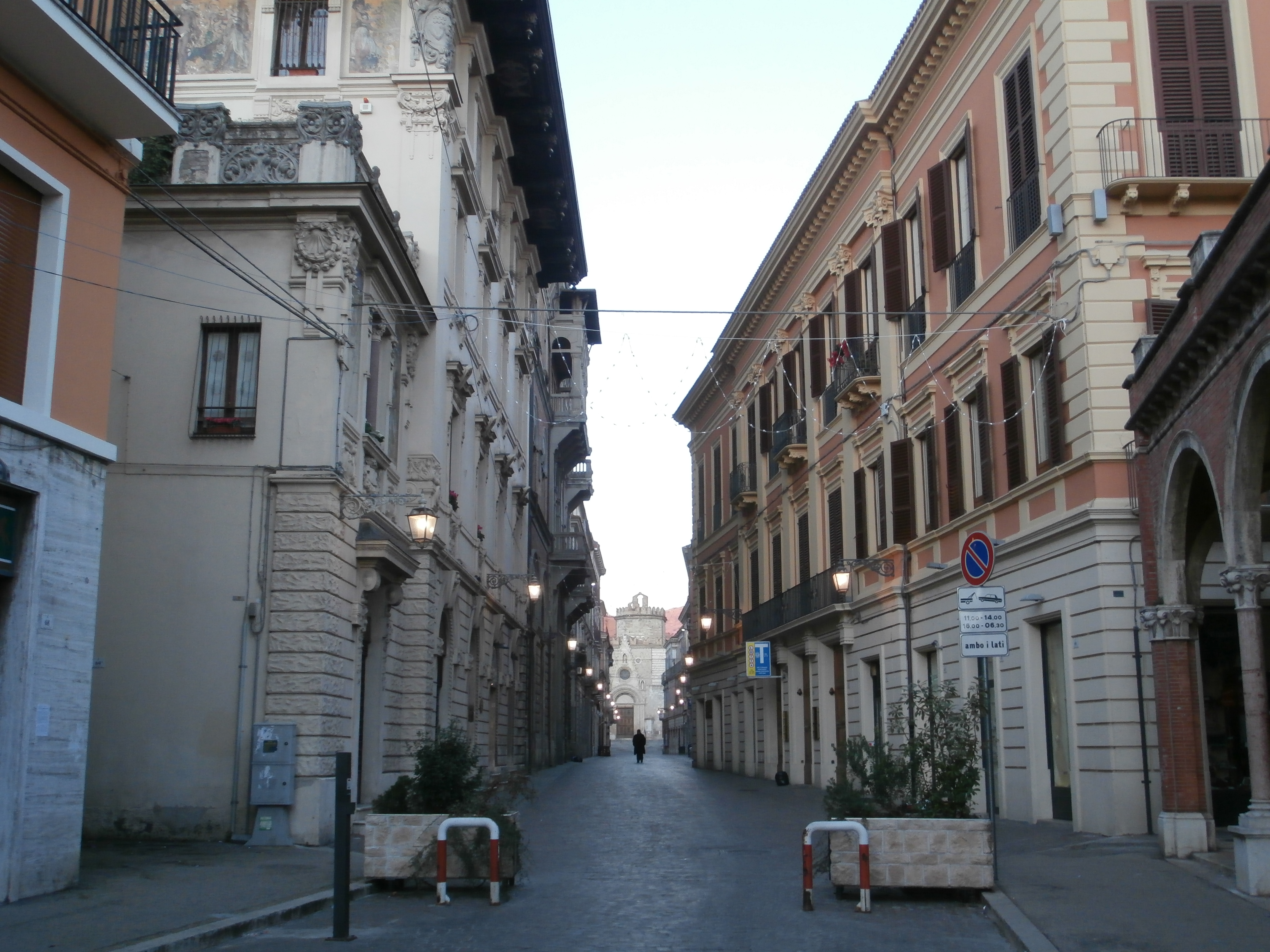 Corso vecchio e Duomo